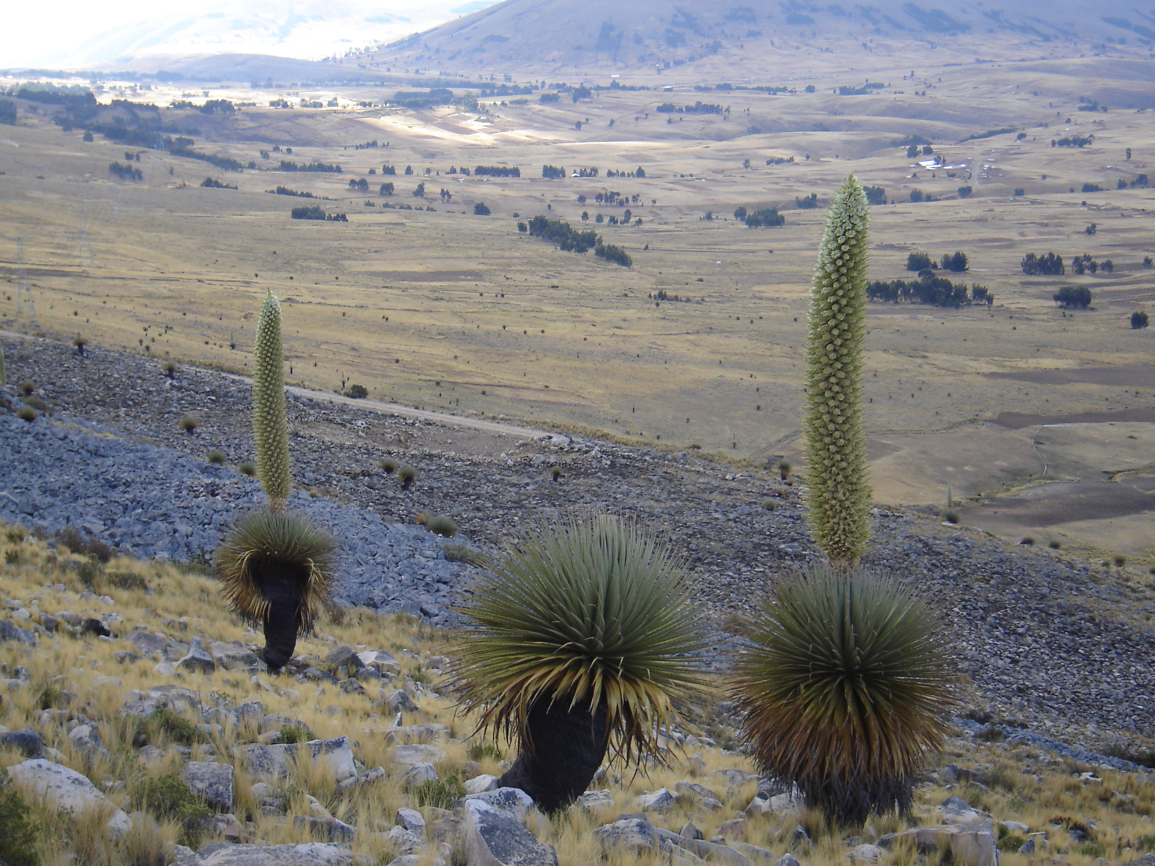 Runa Simi: Chukiqayara mallki Khurupampa urqupi, Wak'as munisipyupi, Wuliwya suyupi.